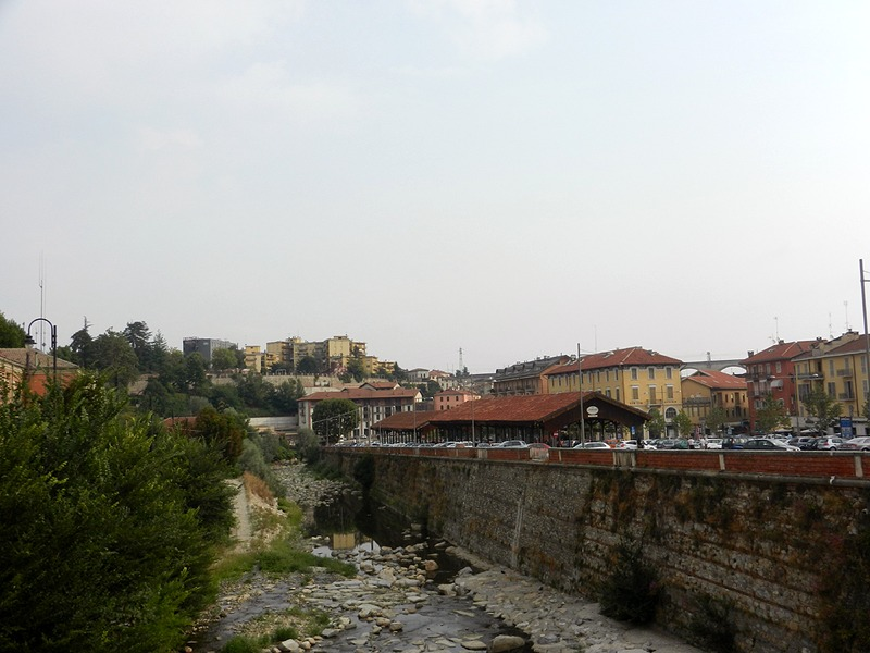 Mondovì - Torrente Ellero